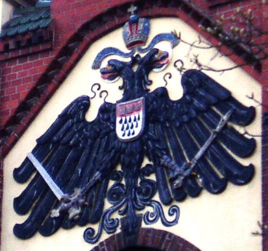 Denkmalgeschütztes Kraftwerk/Umspannwerk in Köln-Ostheim - heraldisch falsches Stadtwappen